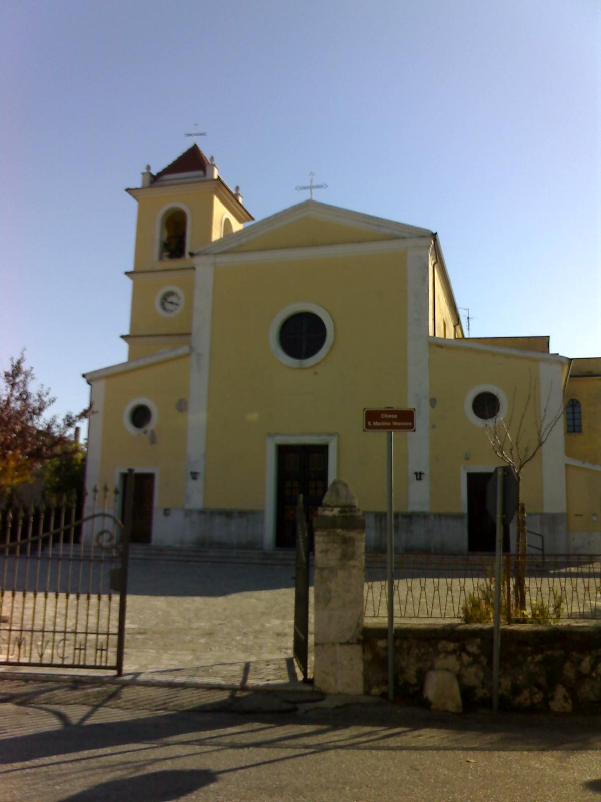 Chiesa di San Martino Vescovo a San Martino Valle Caudina (AV)